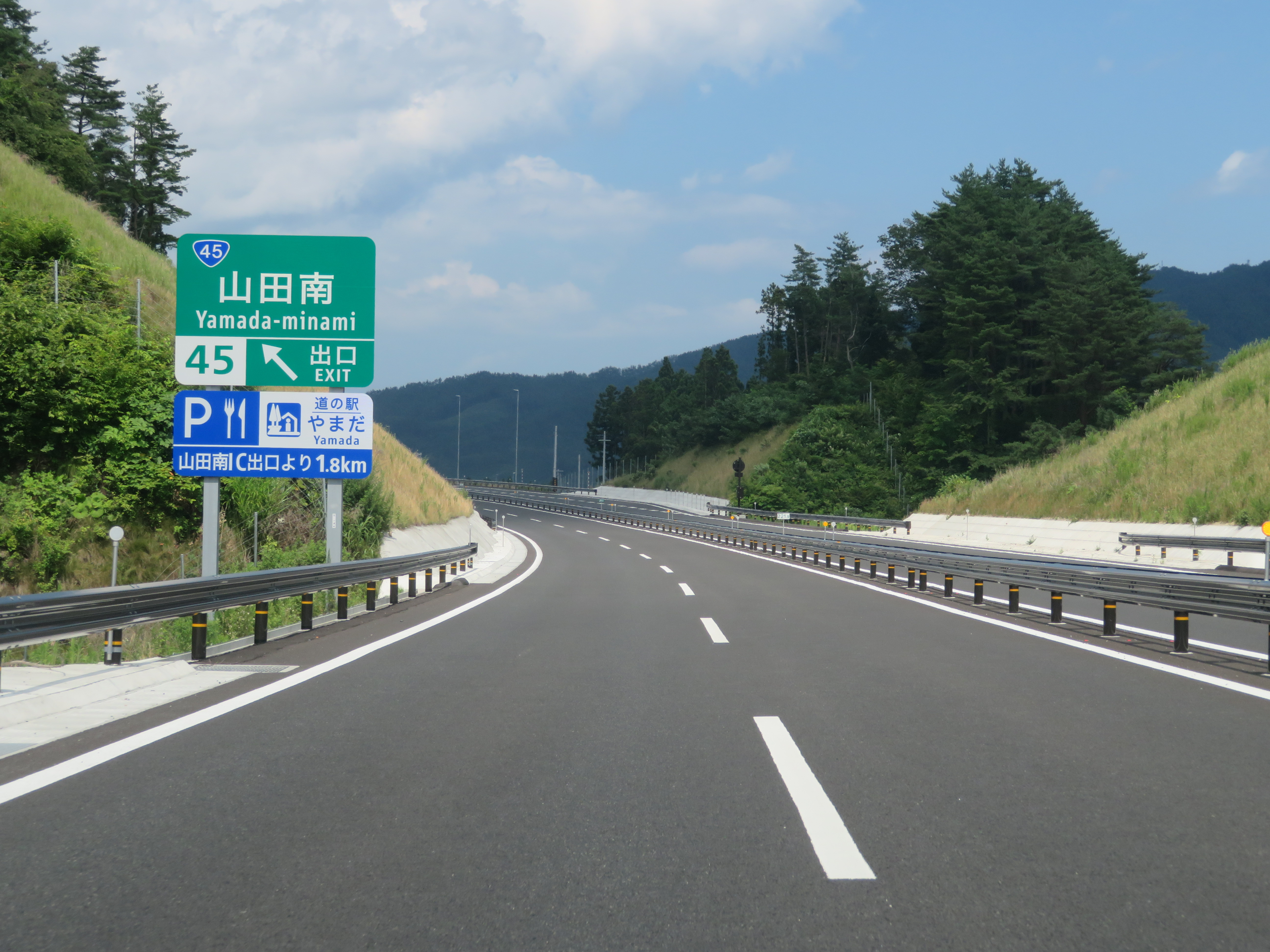 三陸自動車道山田南ＩＣ（釜石ＪＣＴ方面側出口付近）